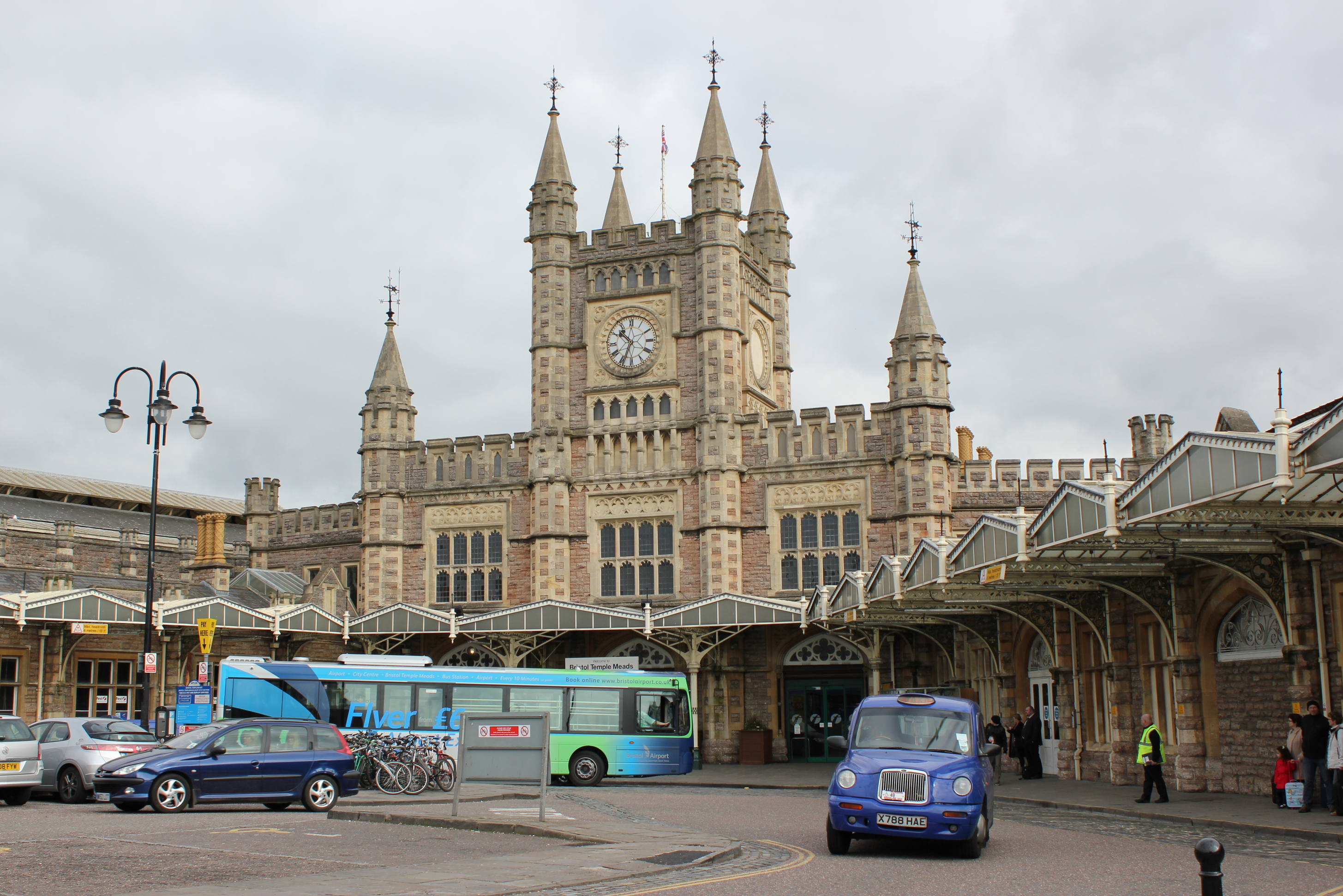 Bahnhof Temple Meads in Bristol, England.